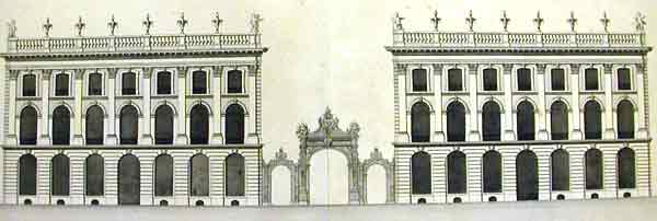 Tracé des pavillons latéraux et du projet initial de grilles